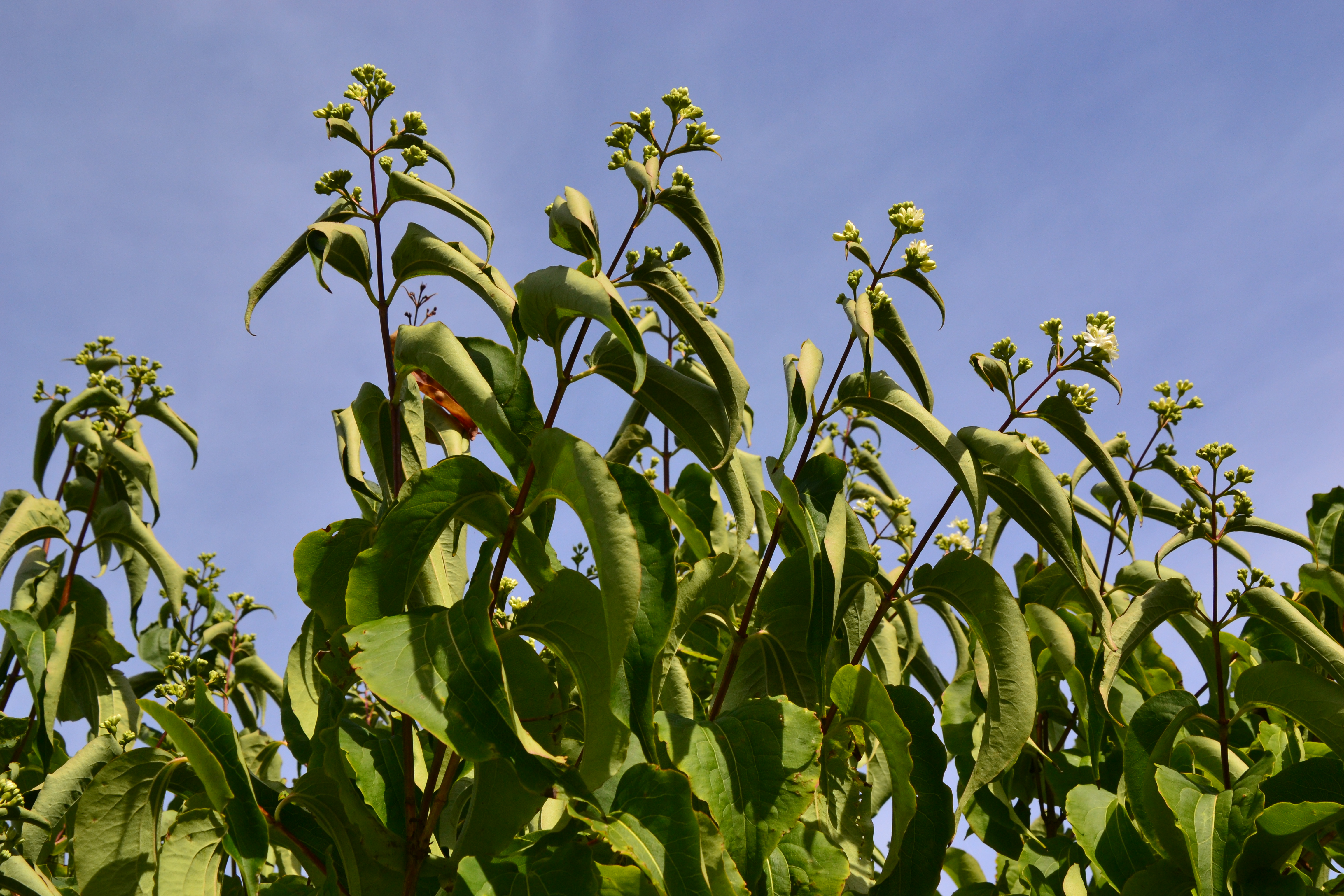 Heptakodium chińskie